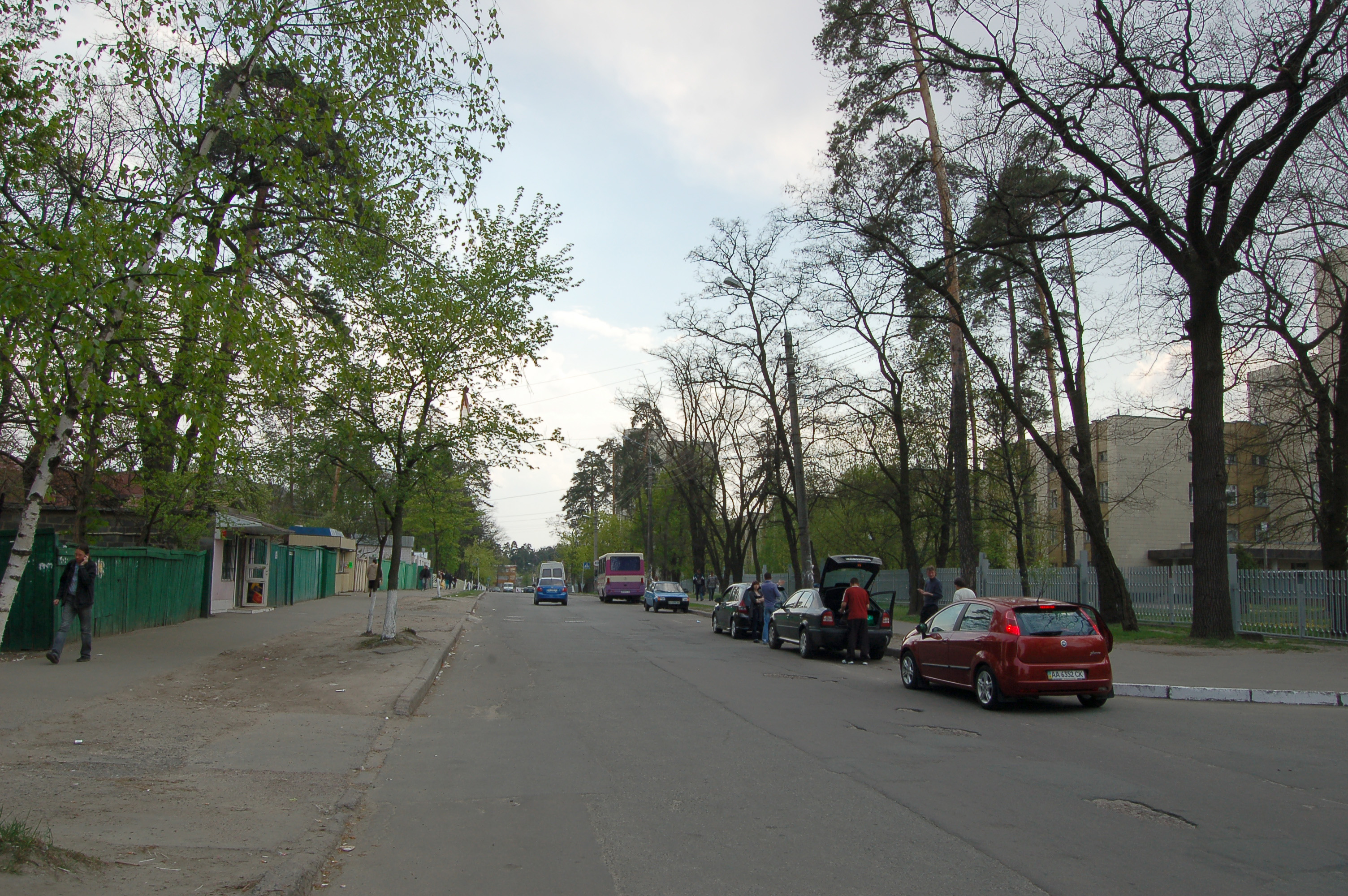 Вулиця Федора Кричевського у Києві